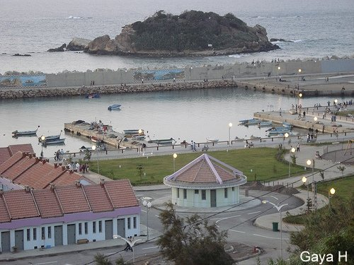 vue du port de Tigzirt et l'ilot